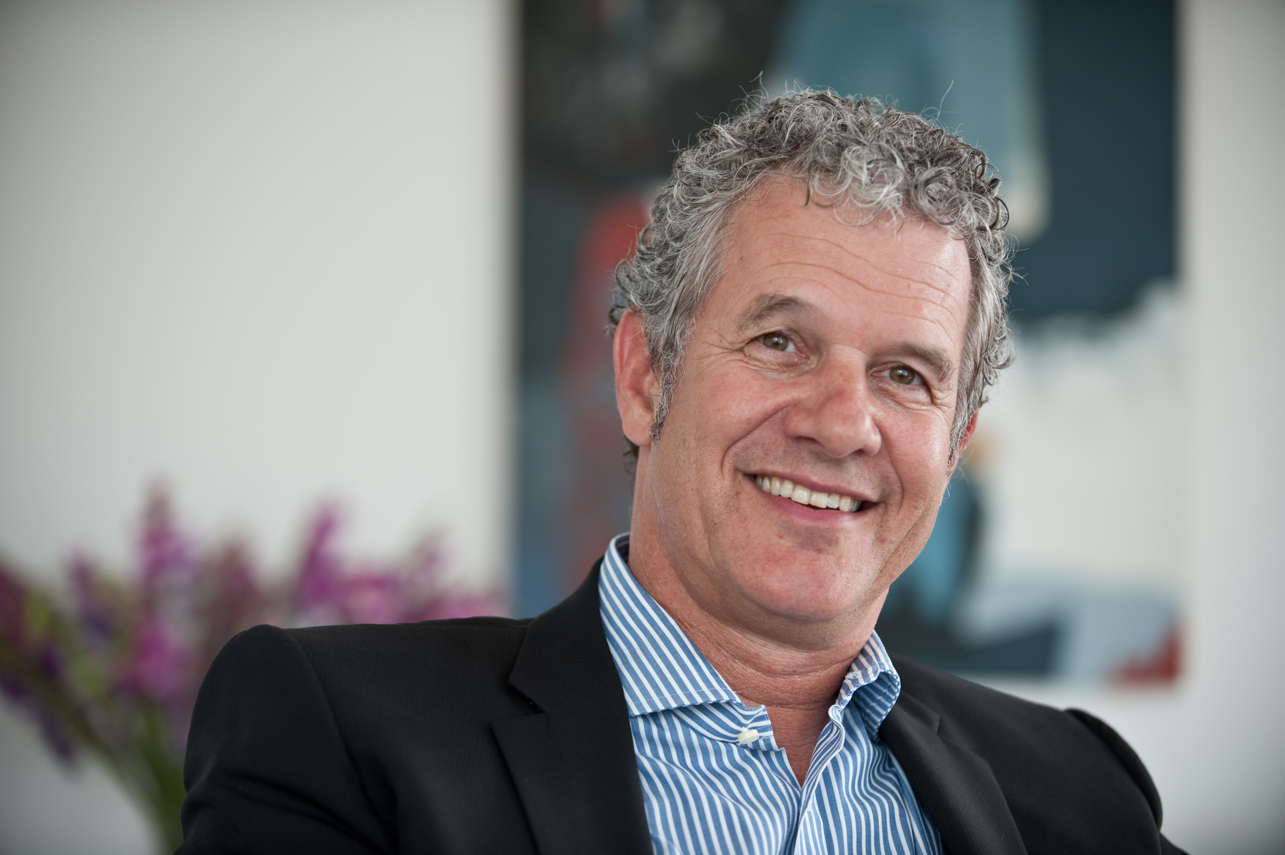 Portrait Matthias R. Lemke